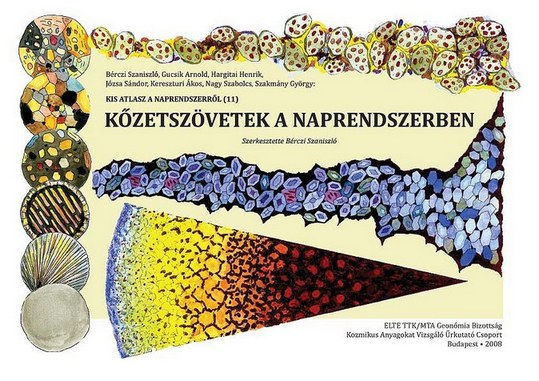 A Kőzetszövetek a Naprendszerben című tankönyv borítója